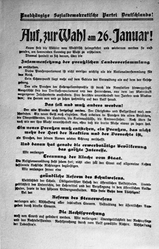 Unabhängige Sozialdemokratische Partei Deutschlands! Auf, zur Wahl am 26. Januar!